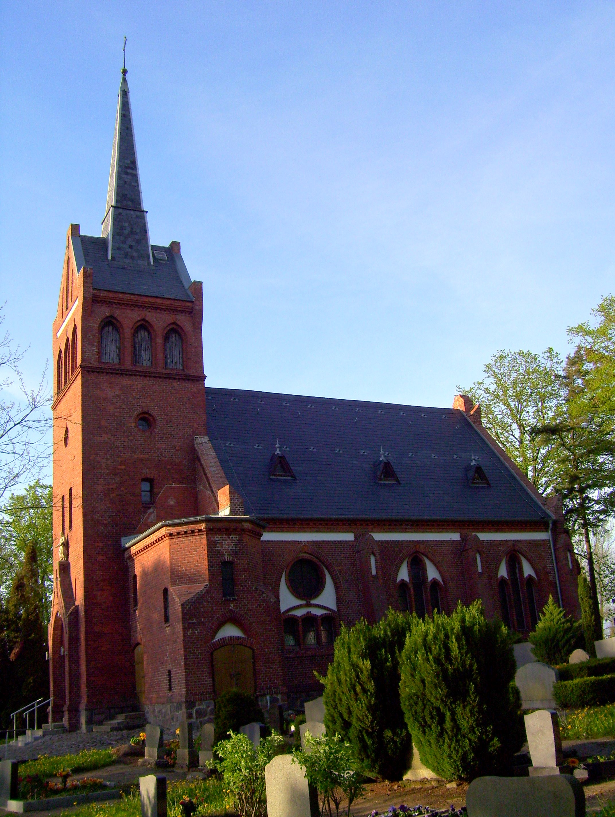 Südseite der Kirche in Ganschendorf, Gemeinde Sarow, Landkreis Demmin